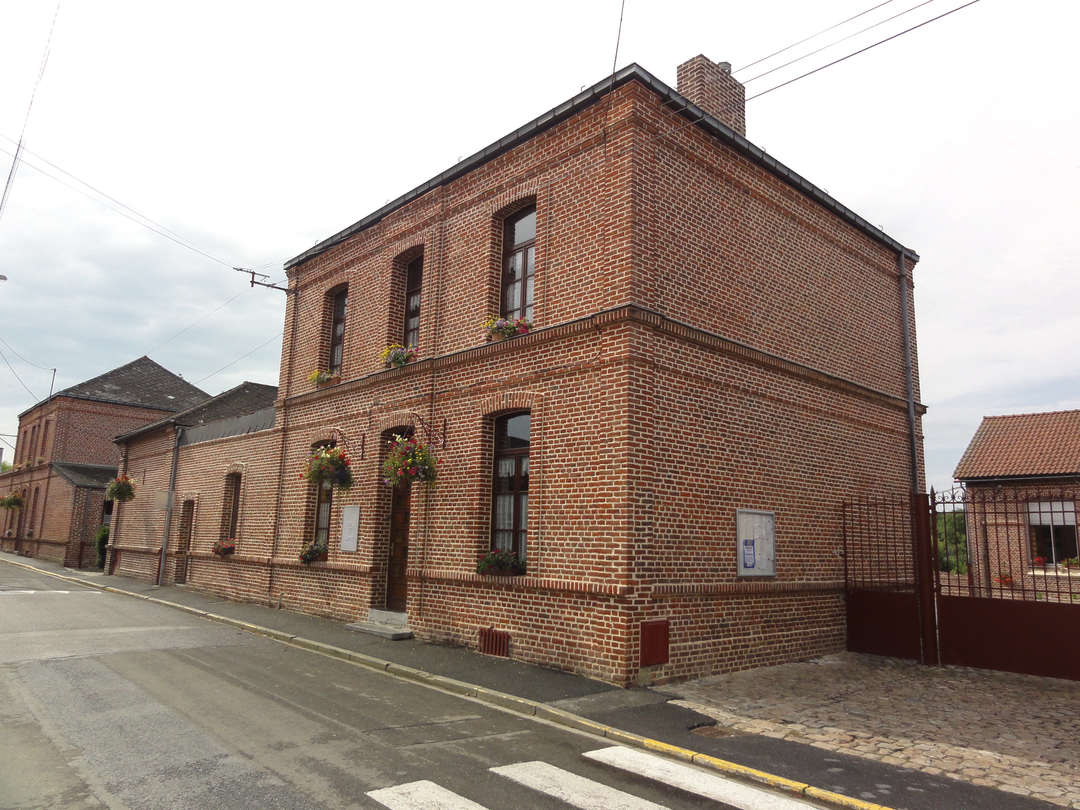 Villers-Pol (Nord, Fr) école